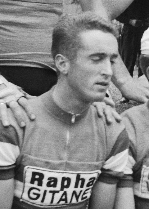 Nationaal Archief Beschrijving: De Nederlandse ploeg, Tour de France 1960 Ab Geldermans Datum: 28 juni 1960 Bestanddeelnummer 911-3748 Vervaardiger: Anefo / Harry Pot (1929–1996) DescriptionDutch photographer and cinematographerDate of birth/death 1929 1996Work location Amsterdam, BentveldAuthority control : Q27877051 VIAF: 284191334 ISNI: 0000 0003 9050 874X Koninklijke: 073478326 creator QS:P170,Q27877051 URL: Voor meer informatie over het Nationaal Archief: Voor meer foto's uit deze en andere collecties, bezoek onze Beeldbank:, U kunt ons helpen onze kennis van de fotocollecties te verrijken door tags en commentaren toe te voegen. Herkent u mensen of locaties of heeft u een bijzonder verhaal te vertellen bij één van de foto's, laat dan een reactie achter (als u ingelogd bent bij Flickr) of stuur een mailtje naar